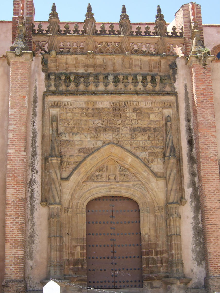 Azuaga Iglesia Parroquial de Ntra. Sra. de la Consolación